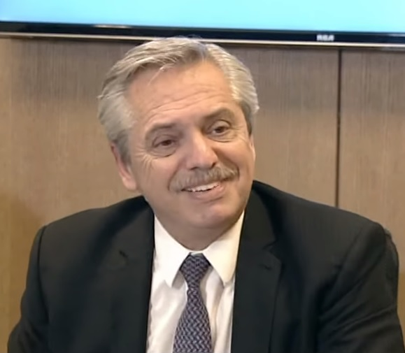 Alberto Fernández habló con la prensa tras su charla con Macri